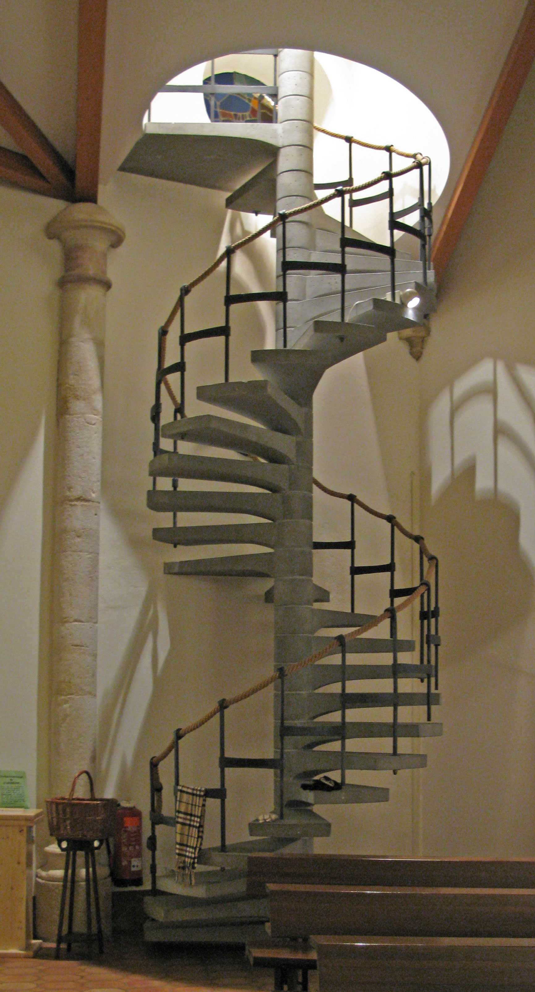 Sptrap.